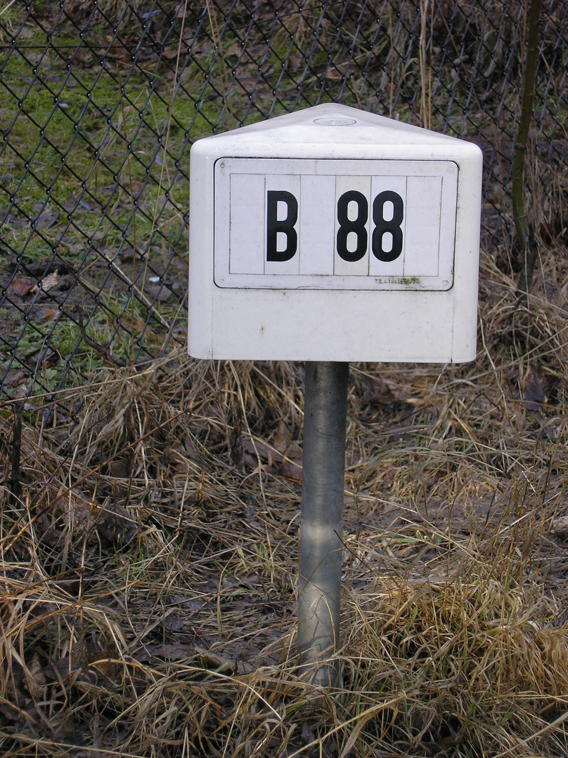 Straßenmarkierung der B88 am Grenzhammer in Ilmenau.